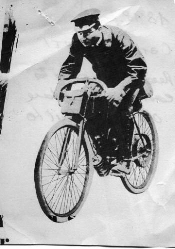 Carlo Maserati (1881-1910) on a velocipede